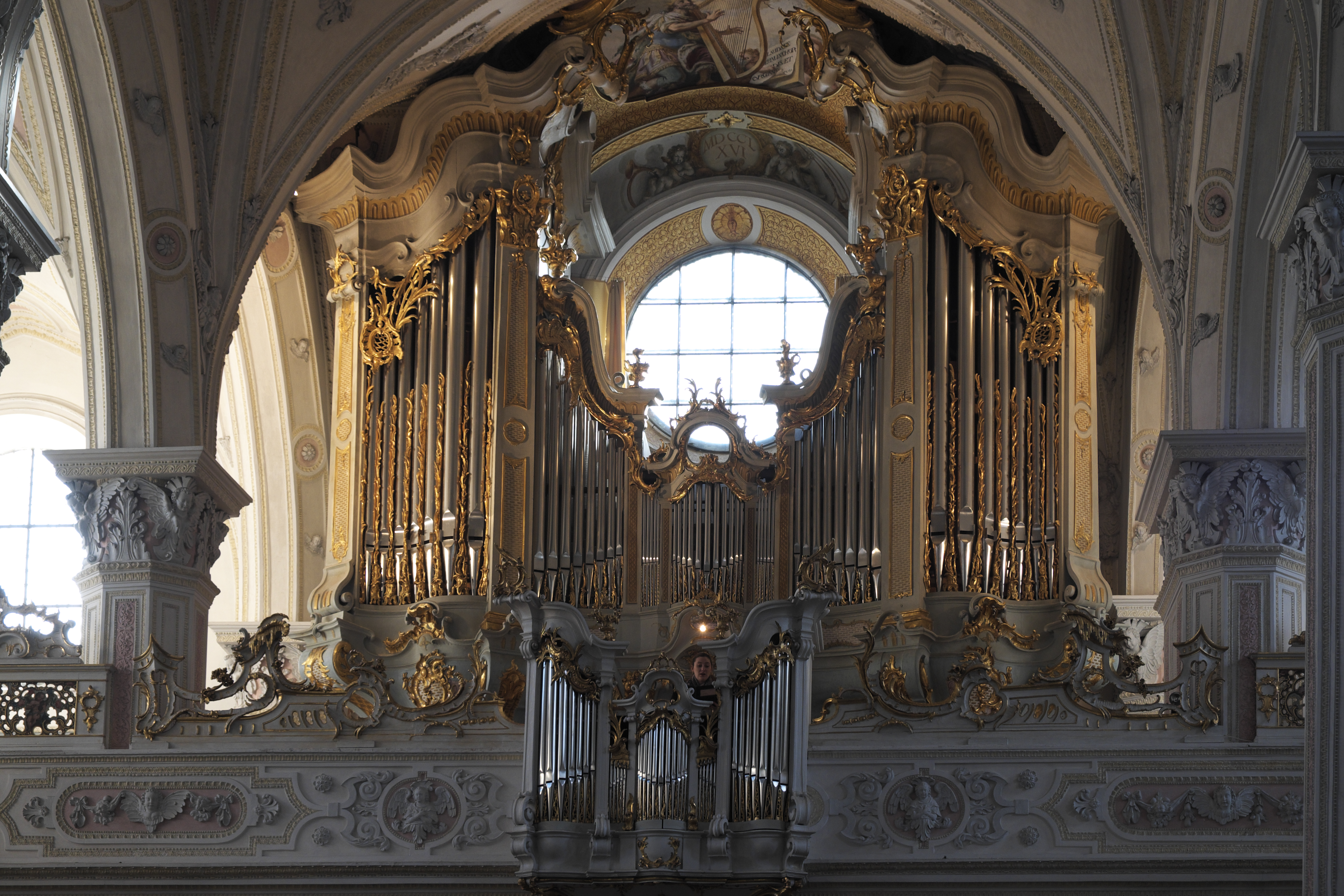 Kirche Heilig Kreuz des ehemaligen Augustinerchorherrenstifts in Polling im Landkreis Weilheim-Schongau (Bayern/Deutschland), Orgel